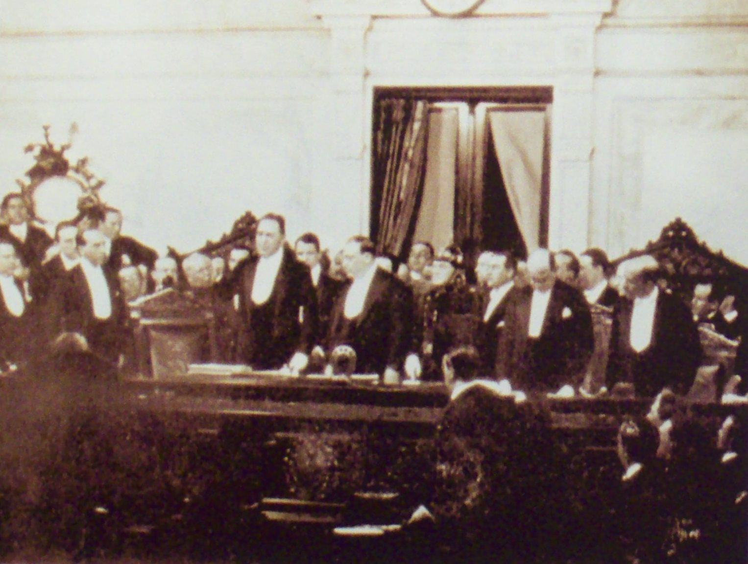 ייִדיש: Yrigoyen dando el discurso inaugural ante el Congreso en 1916.